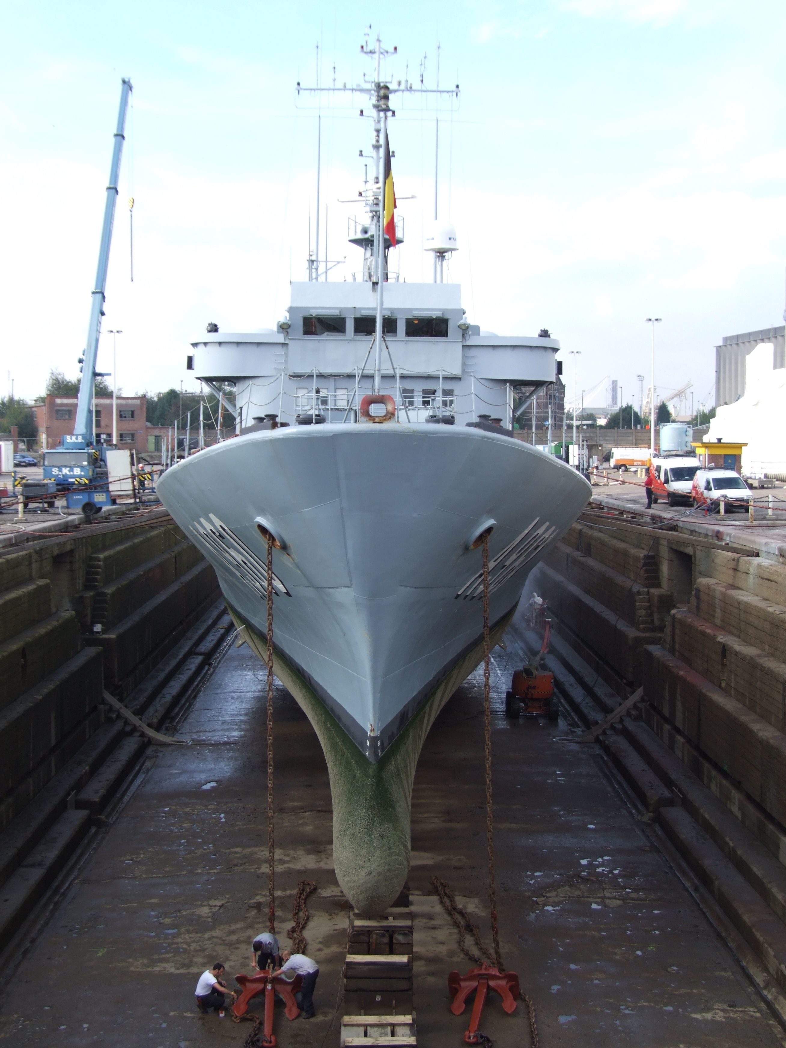 Godetia (A960)